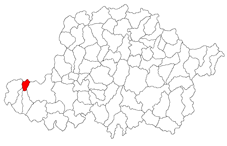 Categorie:Hărţi ale judeţului Arad